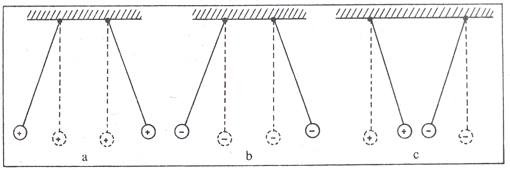 Mota bereko karga elektrikoen artean aldaratze-indarra sortzen da (a eta b irudiak); mota desberdinetakoen artean erakartze-indarra (c irudia).